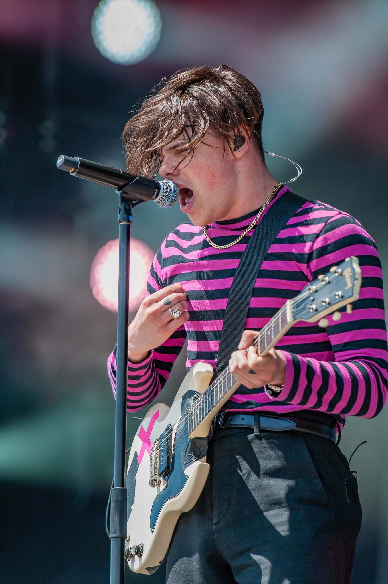 ARGO-Konzerte,Festival,Konzert,Livekonzert,Livemusik,Musik,RiP,Rock im Park 2018,Yungblud,Zeppelin Stage